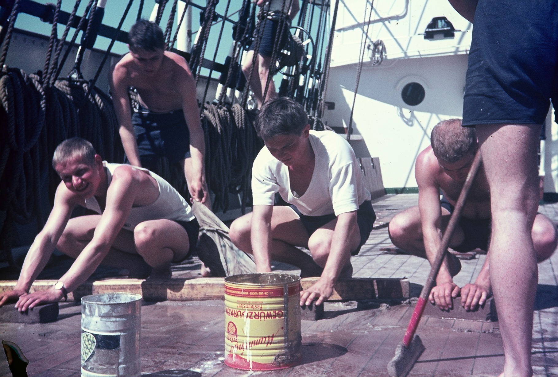 Reinigung vom Holzdeck der Gorch Fock (1958) mit Sand, Wasser und Bimsstein